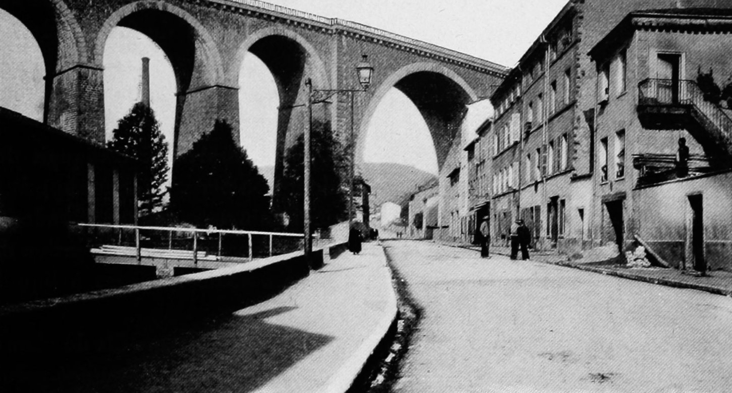 Dictionnaire illustré des communes du département du Rhône. Tome 2 / par MM. E. de Rolland et D. Clouzet.